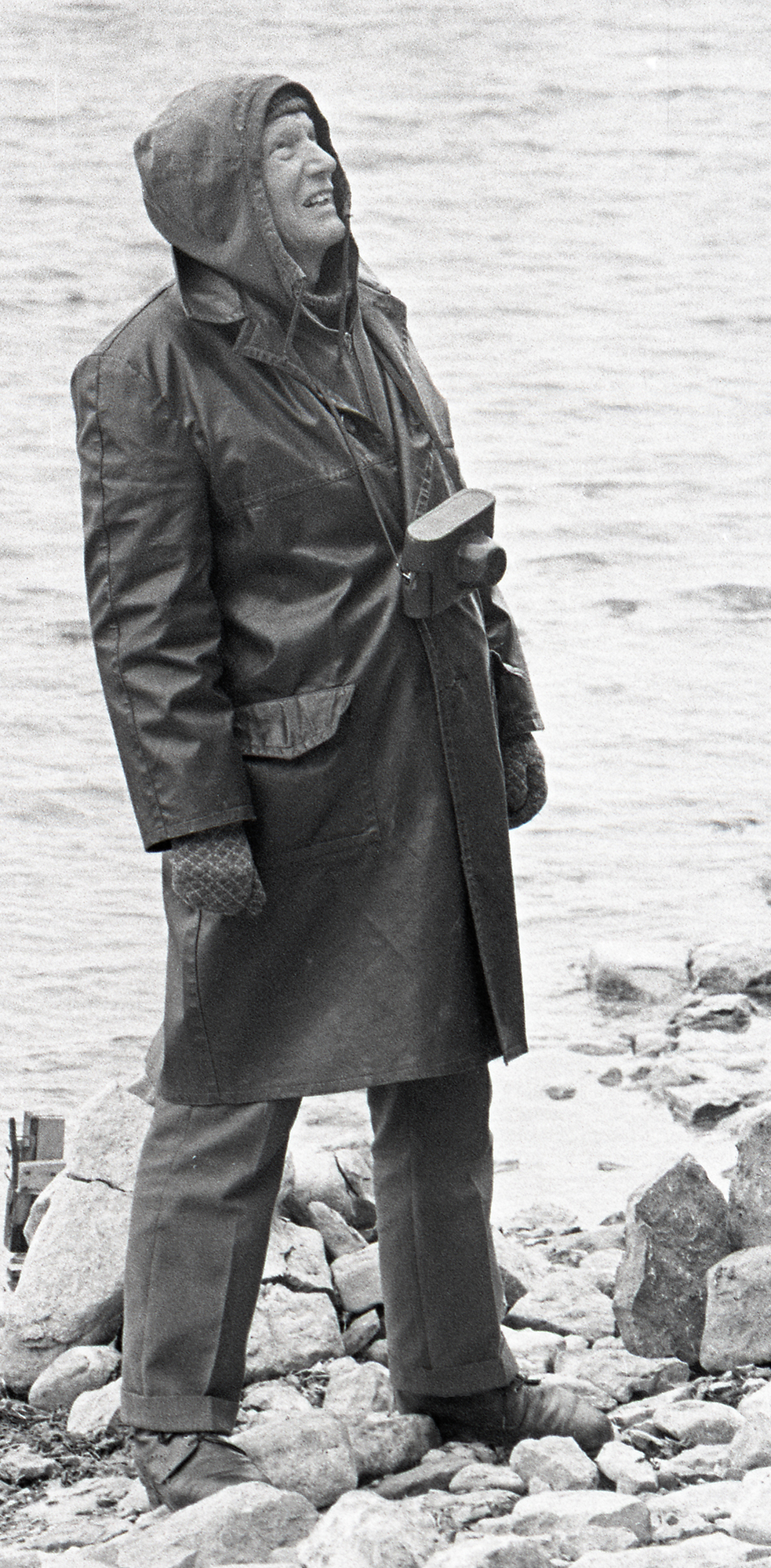 Albert Sulg